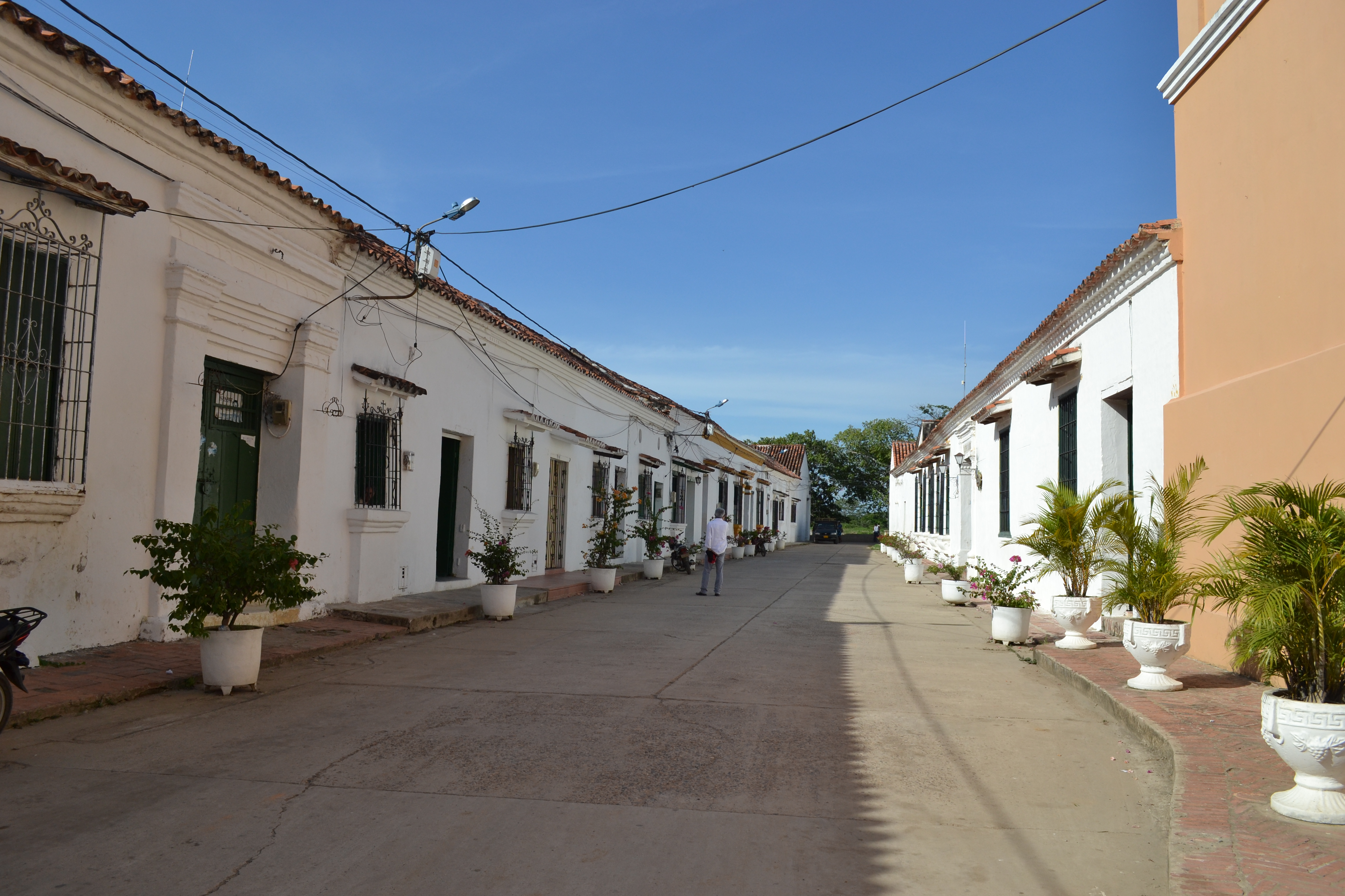 Sector Antiguo de la Ciudad de Mompóx